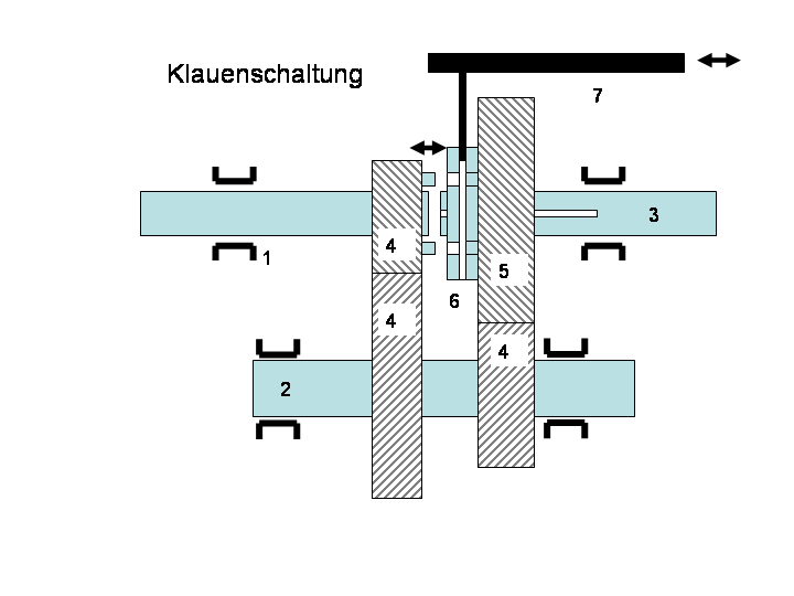 Skizze 2 einer Klauenschaltung